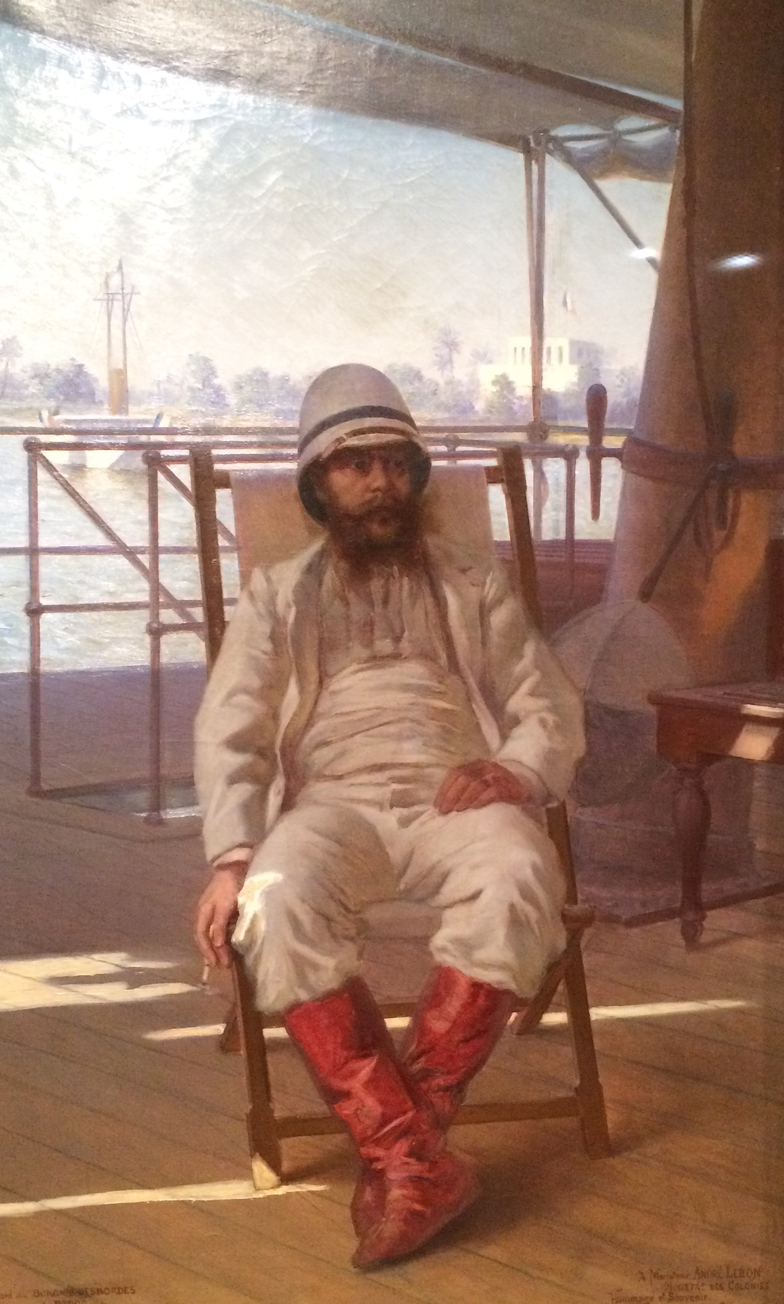 Portrait d'André Lebon, ministre des colonies, tableau de Paul Merwart (1855-1902). Huile sur toile de 1897. Le ministre des colonies est représenté à bord d'un bâteau vers Podor au Sénégal. Don de son fils au Musée de la France d'Outre-mer en 1939. Actuelles collections du Musée du Quai Branly - Jacques Chirac.